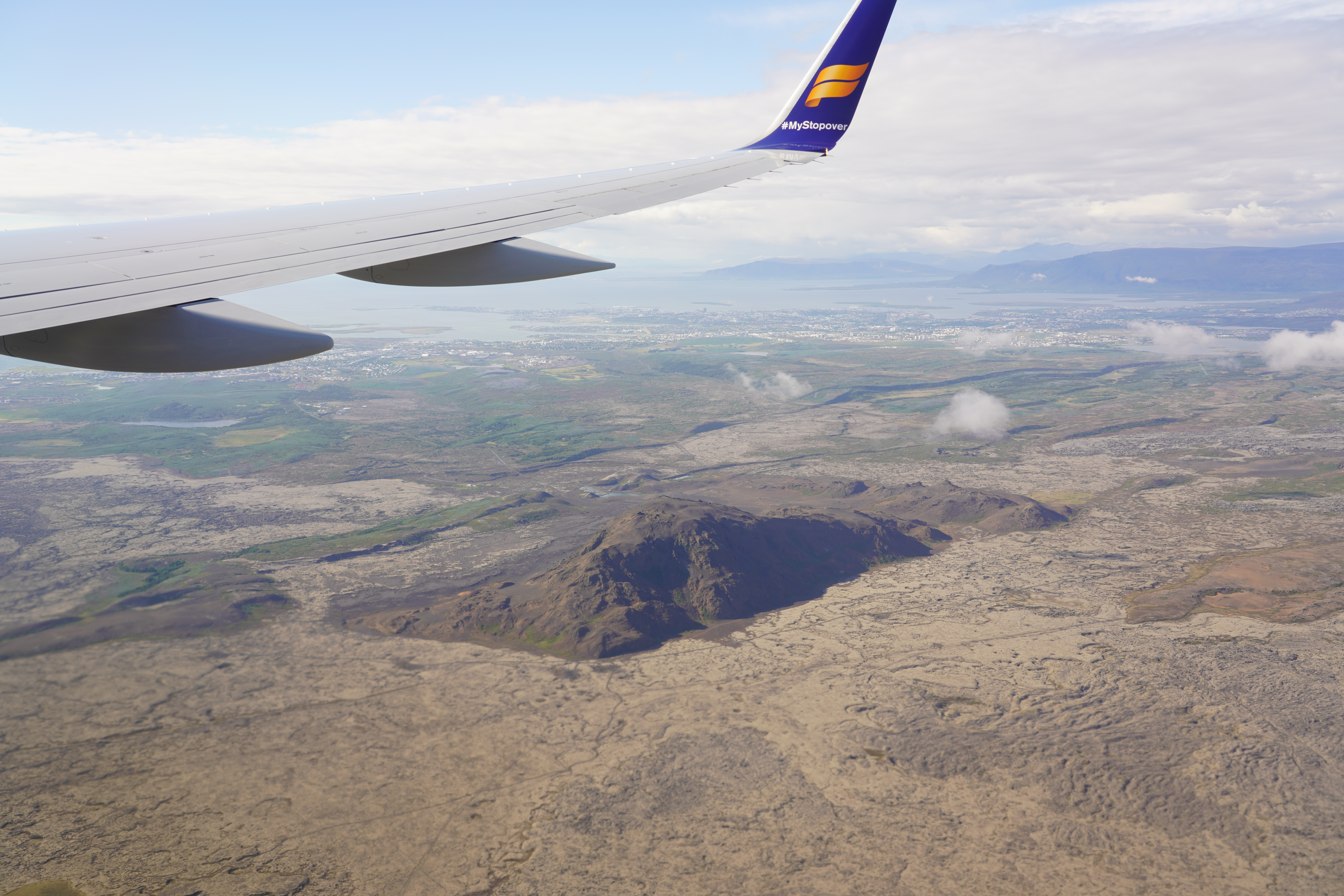 Icelandic aerial-view